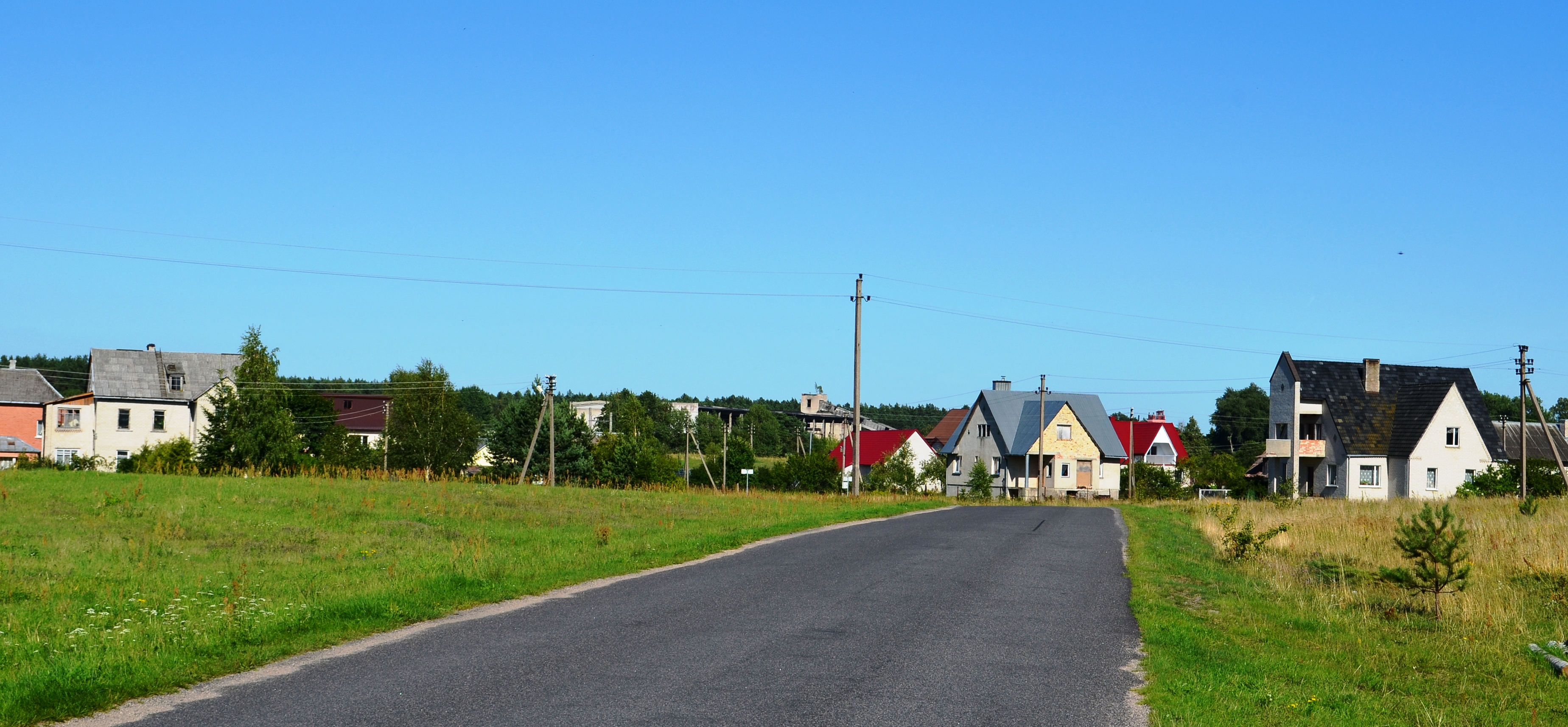 Bezdonys, Vilniaus r.